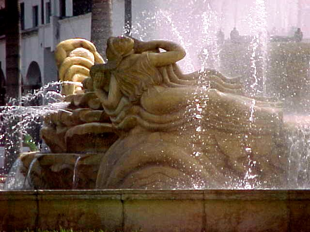 Plaza Oleary (Obra Las Toninas de Francisco Narváez) en el municipio Libertador, Distrito Capital - Venezuela (2000)